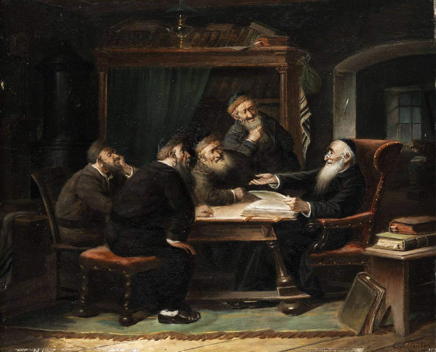 Quan cảnh về người do thái